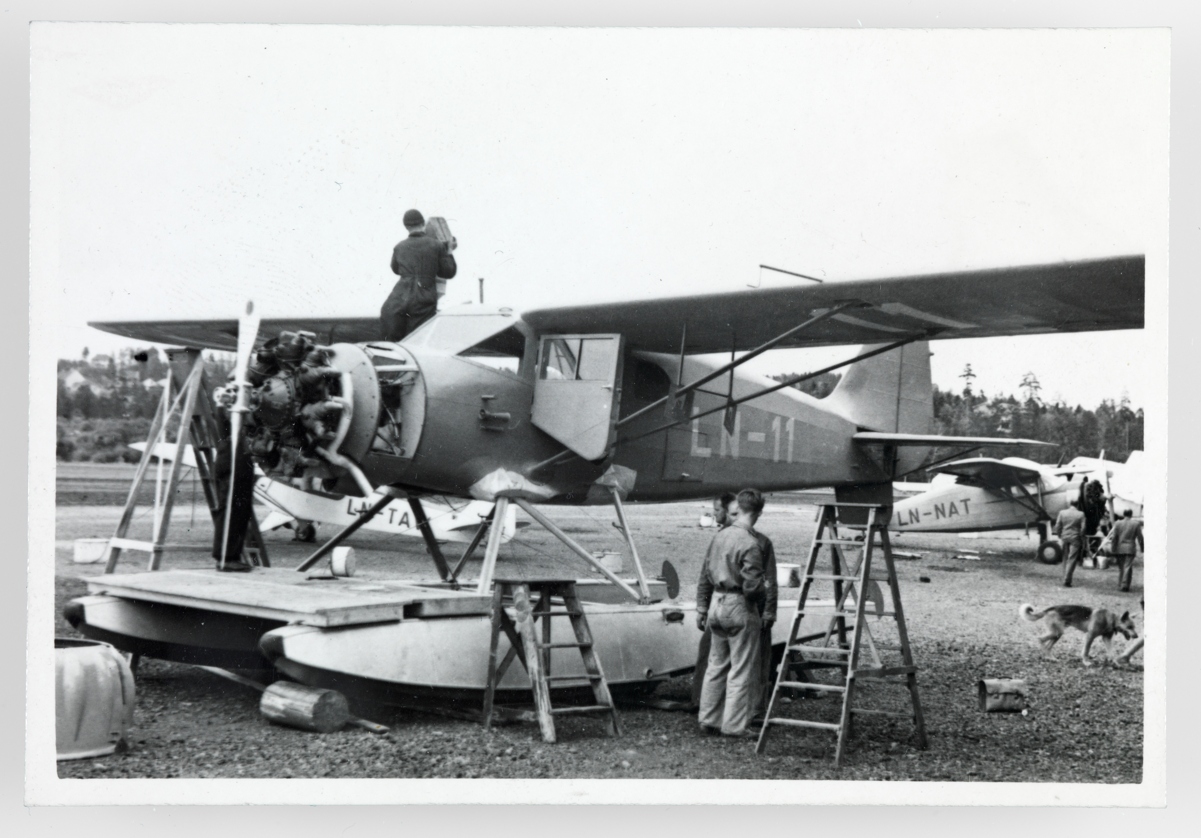 Tre mekanikere arbeider med flyet "Hønningstad C-5 Polar" som står parkert på en slette.